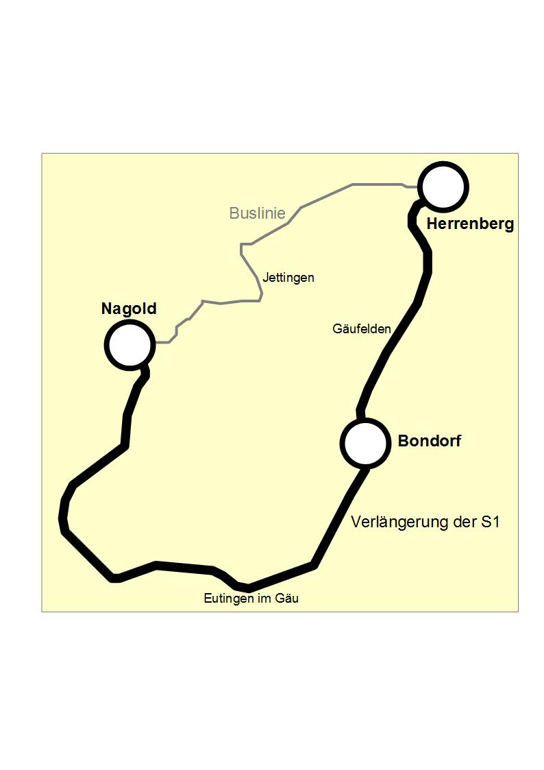 Eine Grafik, die den geplanten Linienverlauf der Verlängerung der S1 S-Bahn Stuttgart von Herrenberg über Bondorf nach Nagold mit der direkten Buslinie zwischen den beiden Städten.